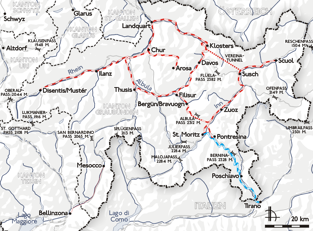 Streckennetz der Rhätischen Bahn (RhB)rot: Stammnetzblau: Berninalinie